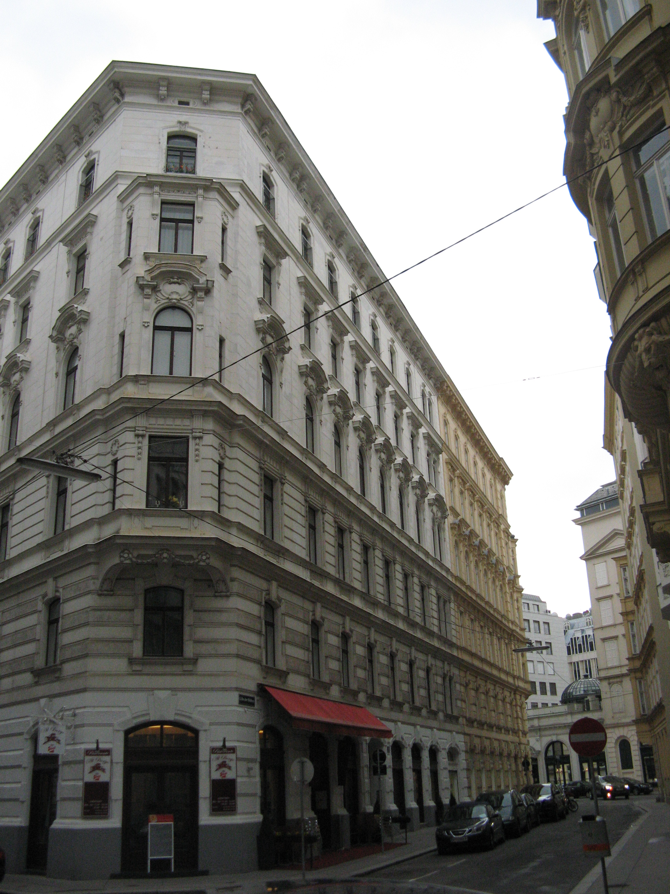 Wohn- und Geschäftshaus (1909) von Carl Steinhofer, An der Hülben 1, Wien-Innere Stadt